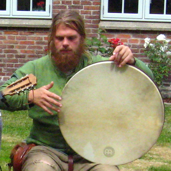 Dansk musiker Jacob Lund i 2013 på Voergaard Slot sammen med Virelai. Han er også kendt fra Huldre og Asynje.